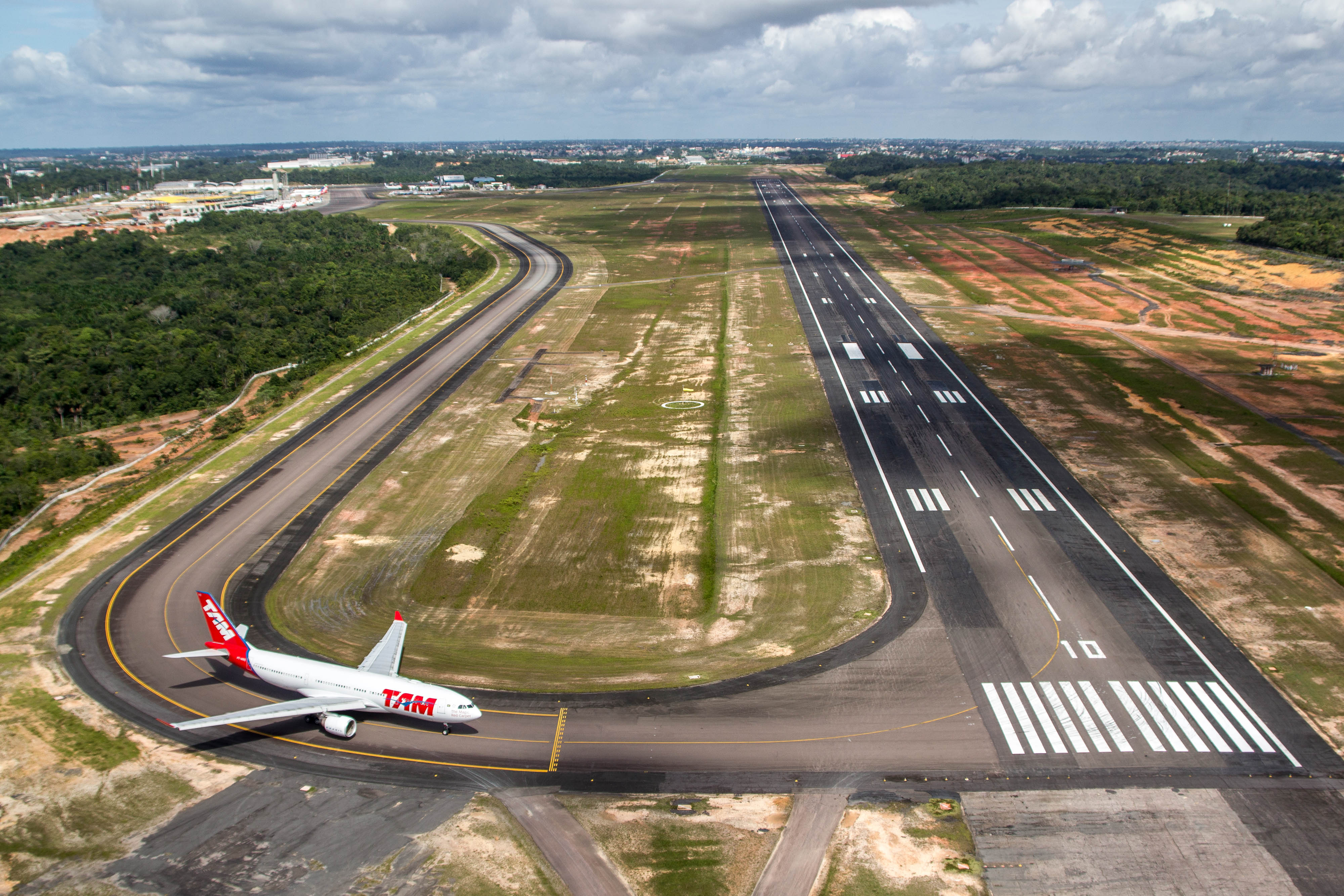 Aeroporto Internacional de Manaus